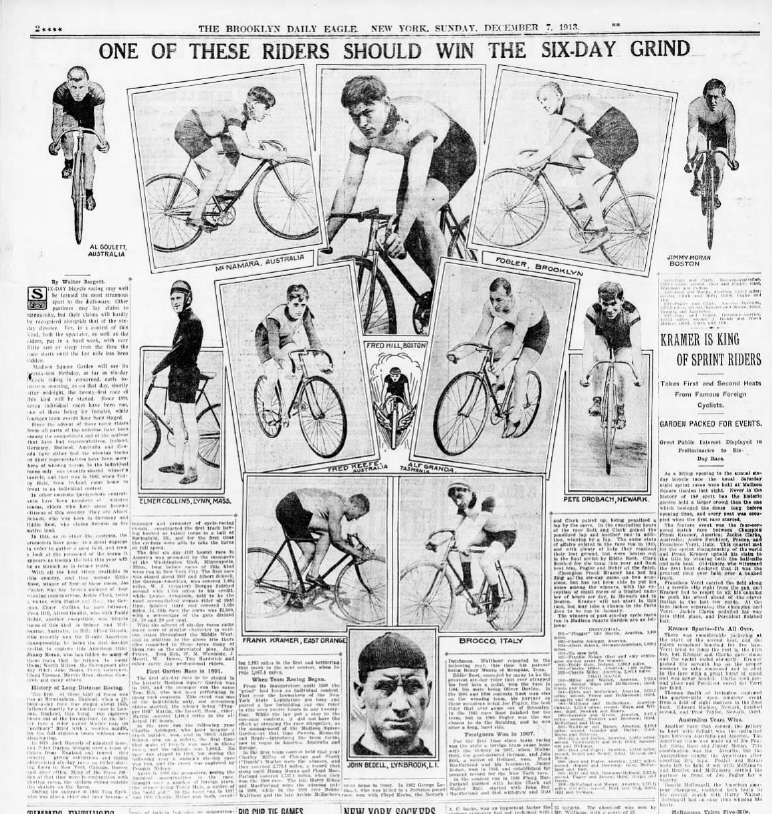 The Brooklyn Daily Eagle (Brooklyn, New York) · Sun, Dec 7, 1913 · Page 34